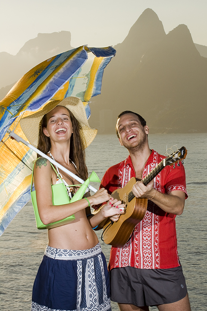 Letícia Novaes e Lucas Vasconcellos no Arpoador, artistas do projeto musical LETUCE, foto para capa de janeiro do Guia NOX do Grupo Matriz Strobist: Canon 580EX II - esquerda 1/2 Canon 580EX II - direita 1/2